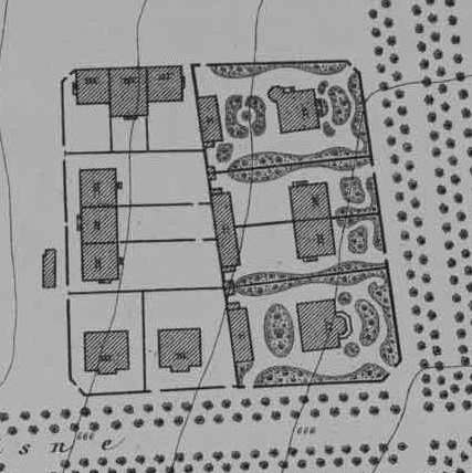 El Palacio de Indo y el Barrio de Indo en el Plano Parcelario de Madrid de 1874, realizado por el Instituto Geográfico y dirigido por Carlos Ibáñez e Ibáñez de Ibero